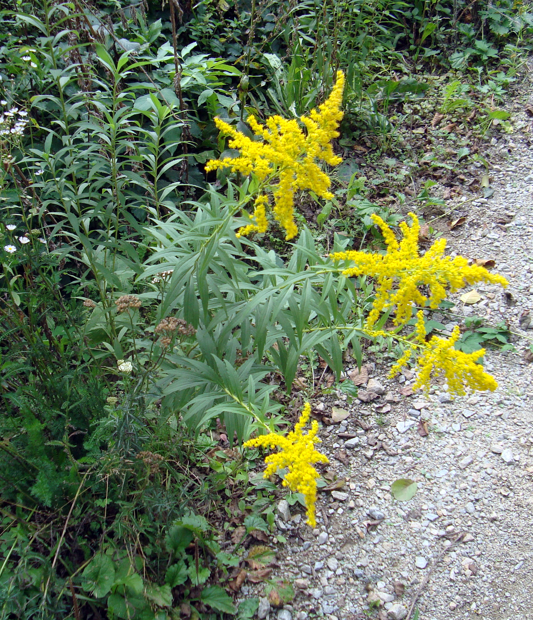 Zlatobýl kanadský, Podkomorské lesy Česká republika, jižní Morava